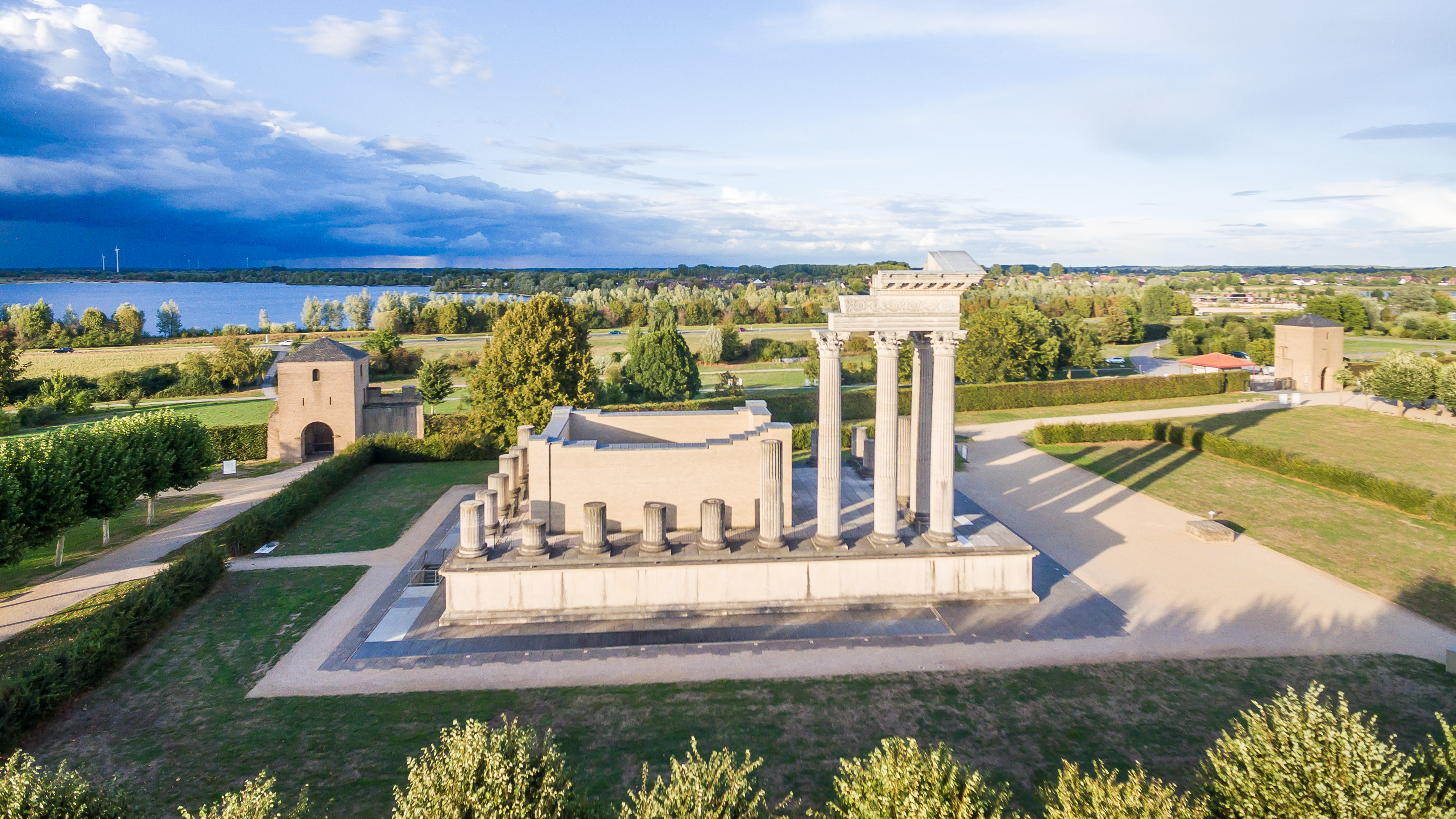 Colonia Ulpia Traiana.. LVR-Archäologischer Park Xanten. Luftaufnahme mit einem Quadkopter